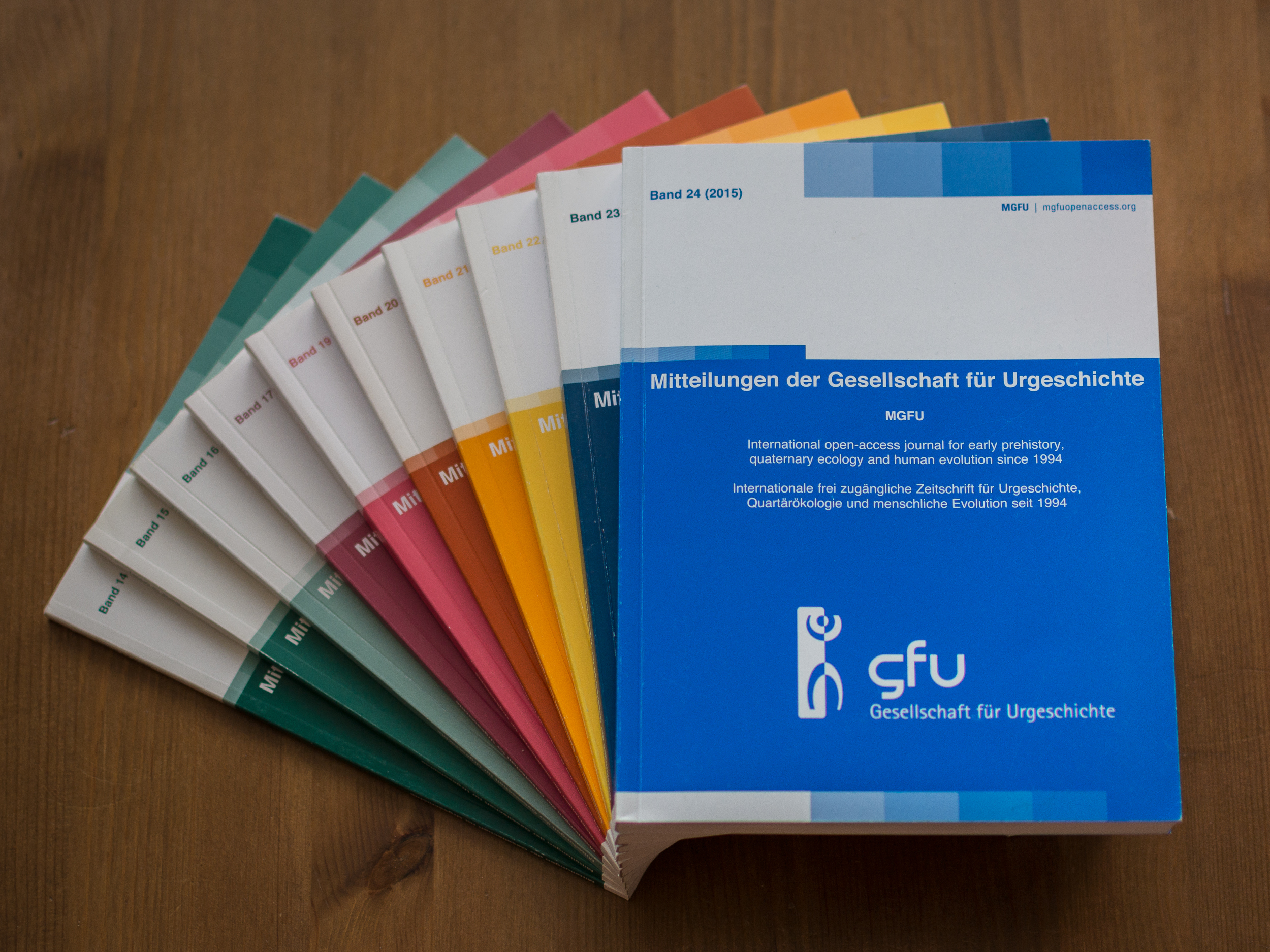 Verschiedene Ausgaben des Jahrbuchs "Mitteilungen der Gesellschaft für Urgeschichte".